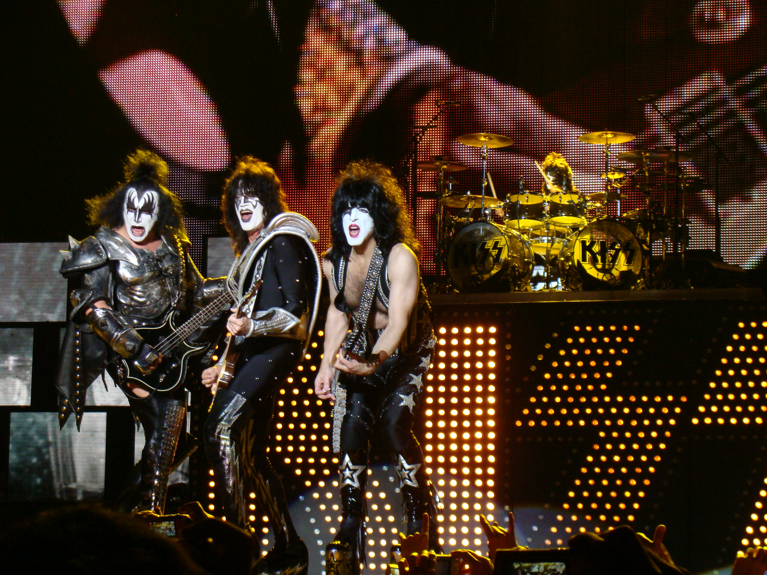 Actuación del grupo KISS en Vitoria-Gasteiz, en el Azkena Rock Festival.